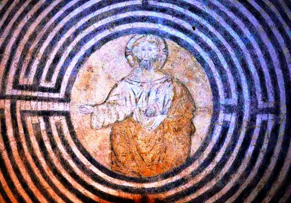 Affresco nella chiesa di San Francesco ad Alatri (FRosinone) che raffigura Cristo al centro di un labirinto.